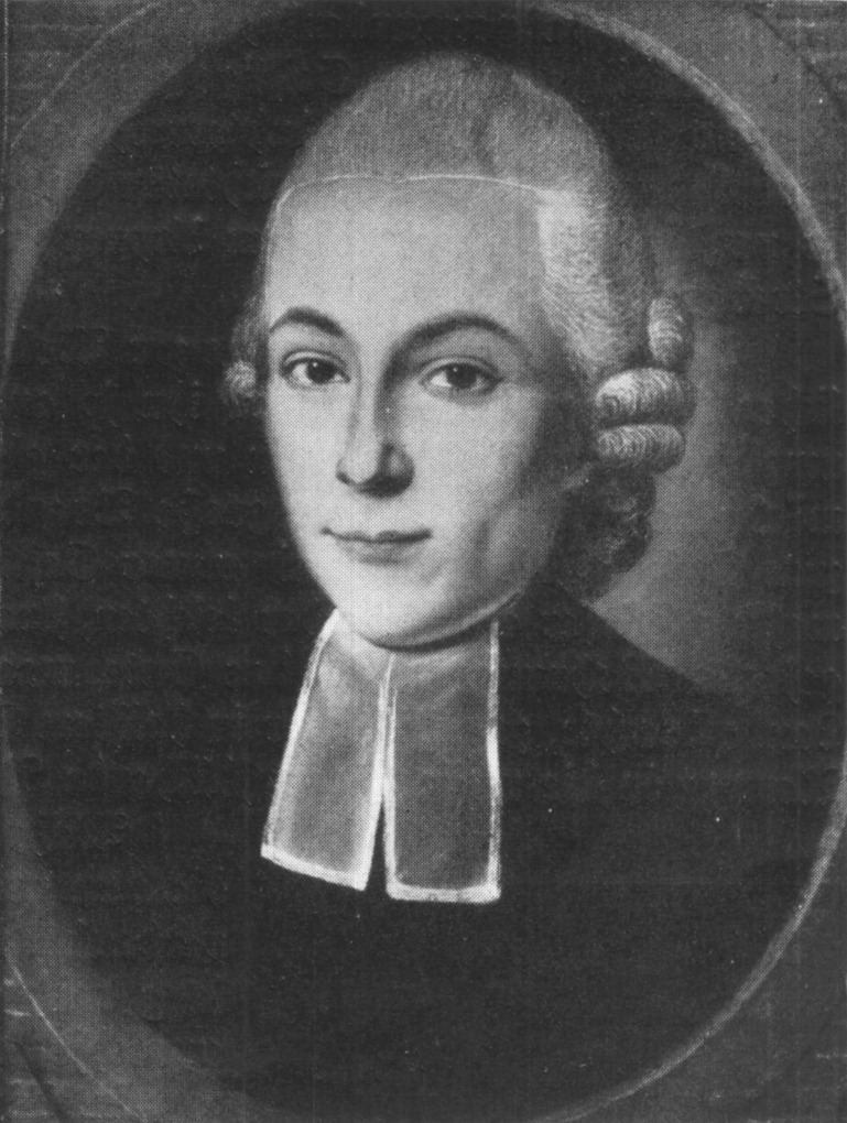 Originalbildunterschrift: Schinkels Eltern. Unbekannter Maler, Pastellgemälde. Hier: Schinkels Vater: Johann Cuno Schinkel (1736–1787), vgl. Neue Deutsche Biographie. Band 22, Berlin 2005, S. 795